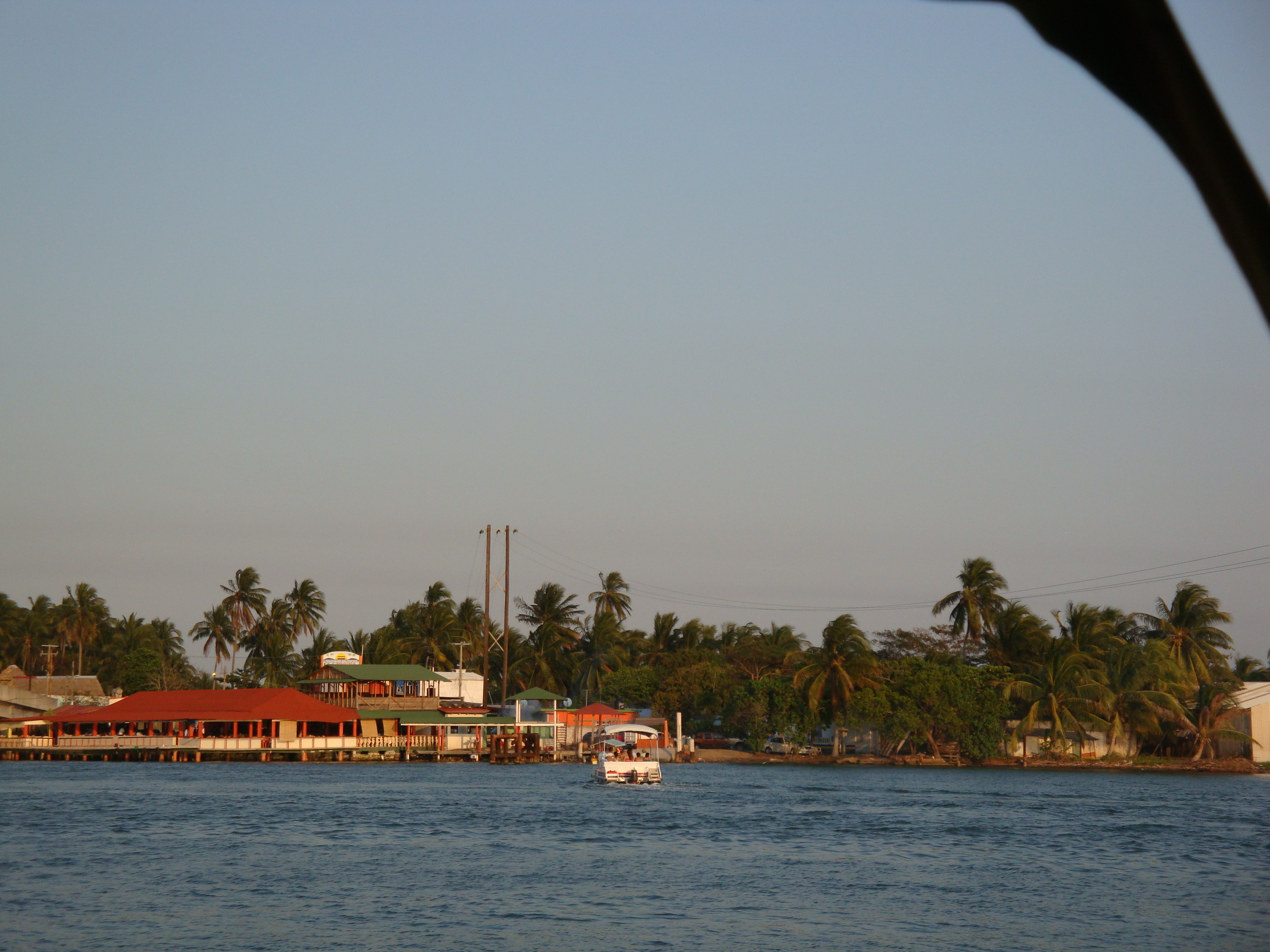 Restaurantes en el centro turístico El Bellote, municipio de Paraíso, Tabasco